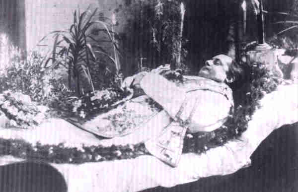 Andreas Niedermayer, deutscher Priester, Historiker, auf dem Sterbebett